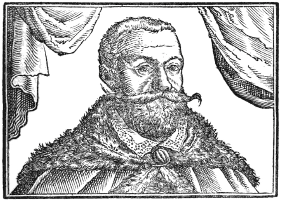 Template:Joachim Graf von Sinzendorff